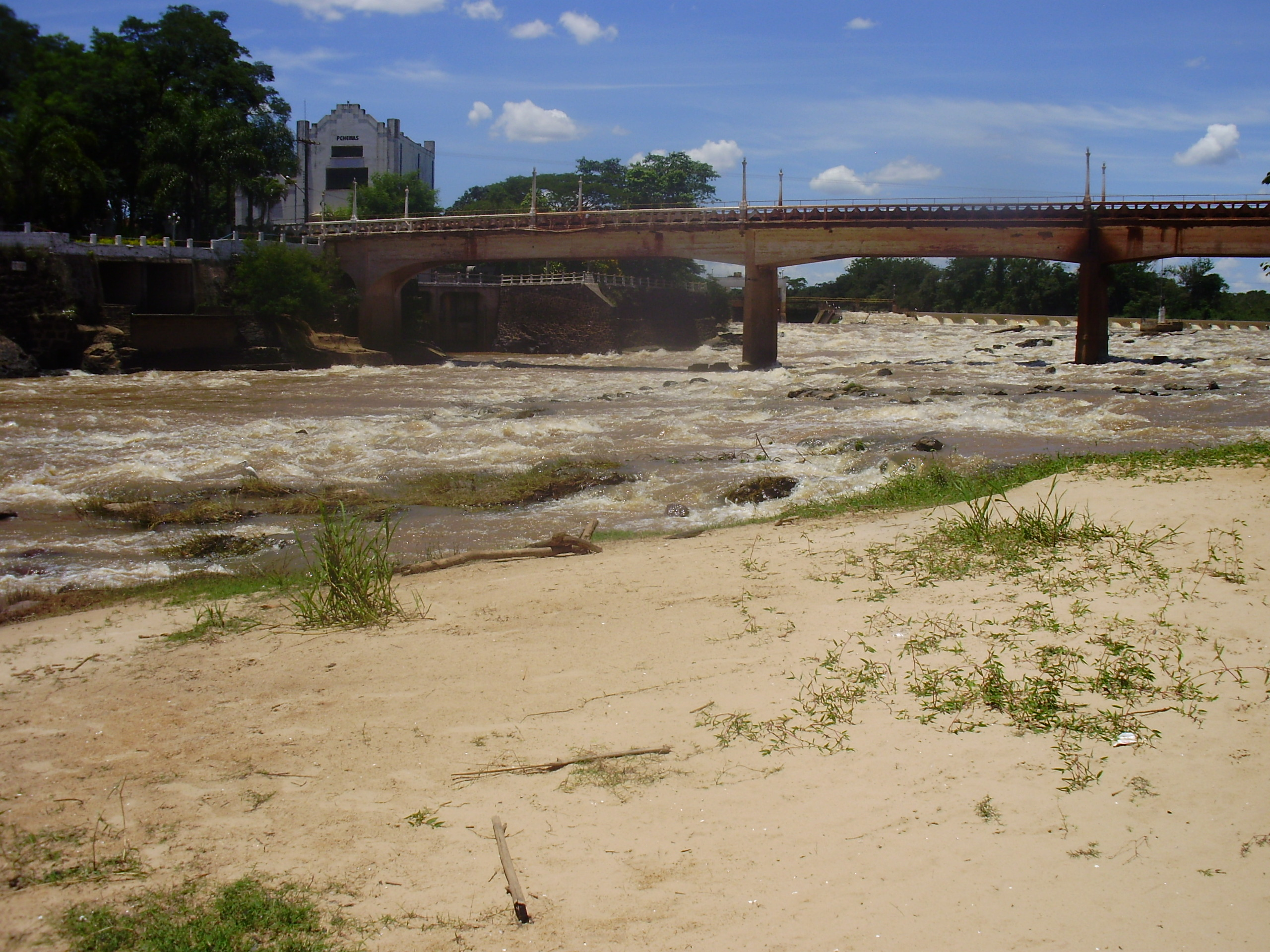 Vista da ponte sobre o rio Mogi Guaçu.